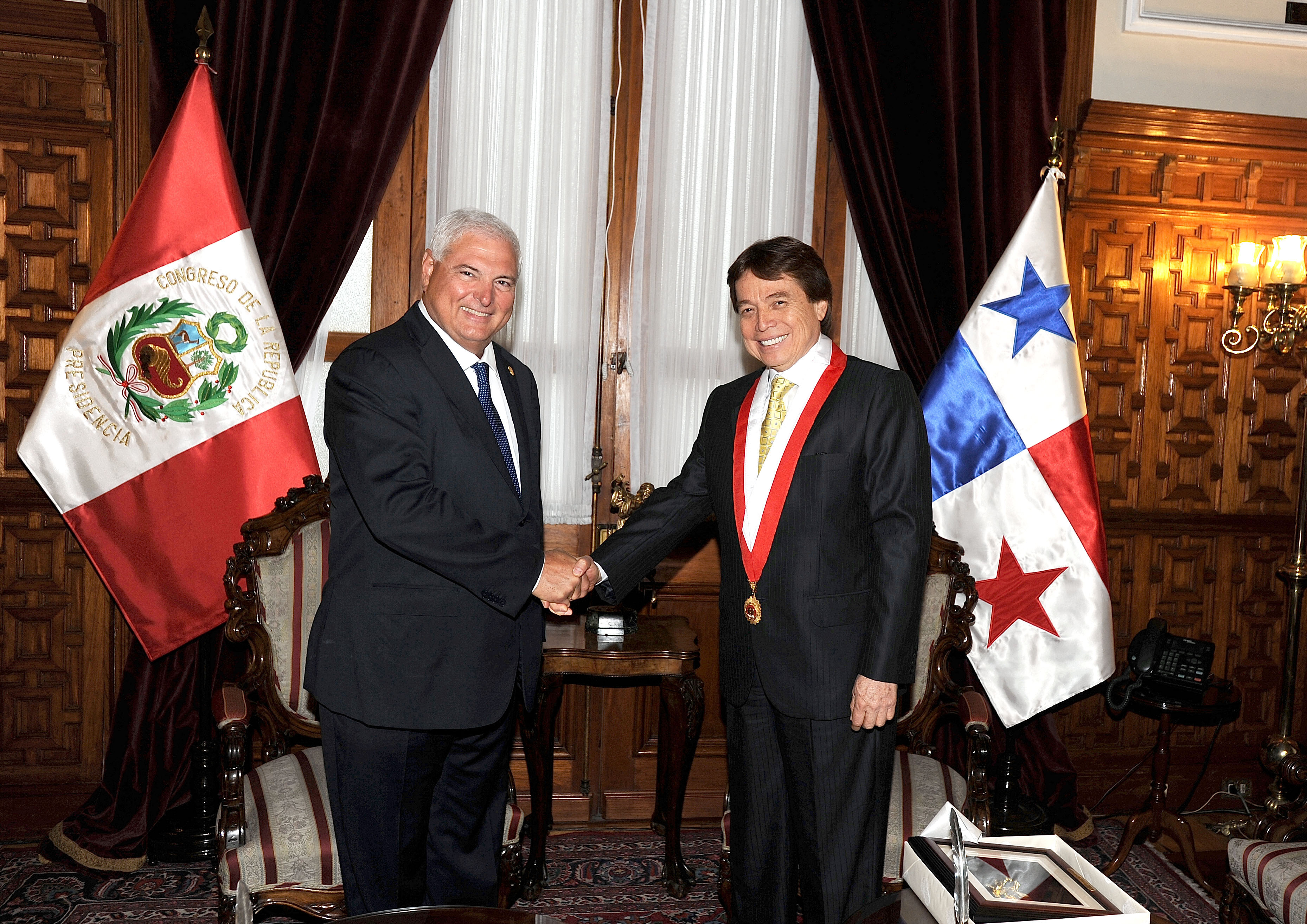 El presidente del Congreso, César Zumaeta Flores, recibe en audiencia especial al presidente de Panamá, Ricardo Martinelli Berrocal, en la Presidencia del Parlamento Nacional. En el encuentro participaron los vicepresidentes Alejandro Aguinaga Recuenco, Alda Lazo Ríos de Hornung y Eduardo Espinoza Ramos, así como también el presidente de la Comisión de Relaciones Exteriores, Hildebrando Tapia Samaniego, entre otros legisladores.